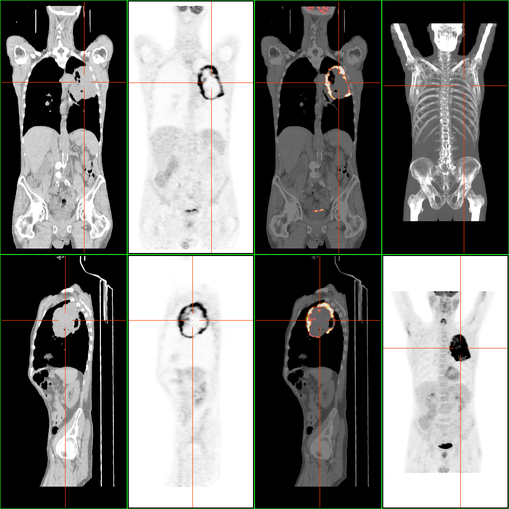 Tumornekrose eines großen Bronchial-Ca in der FDG-PET/CT-Darstellung